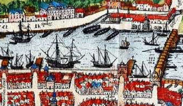 Fragment Alten Stettin-5